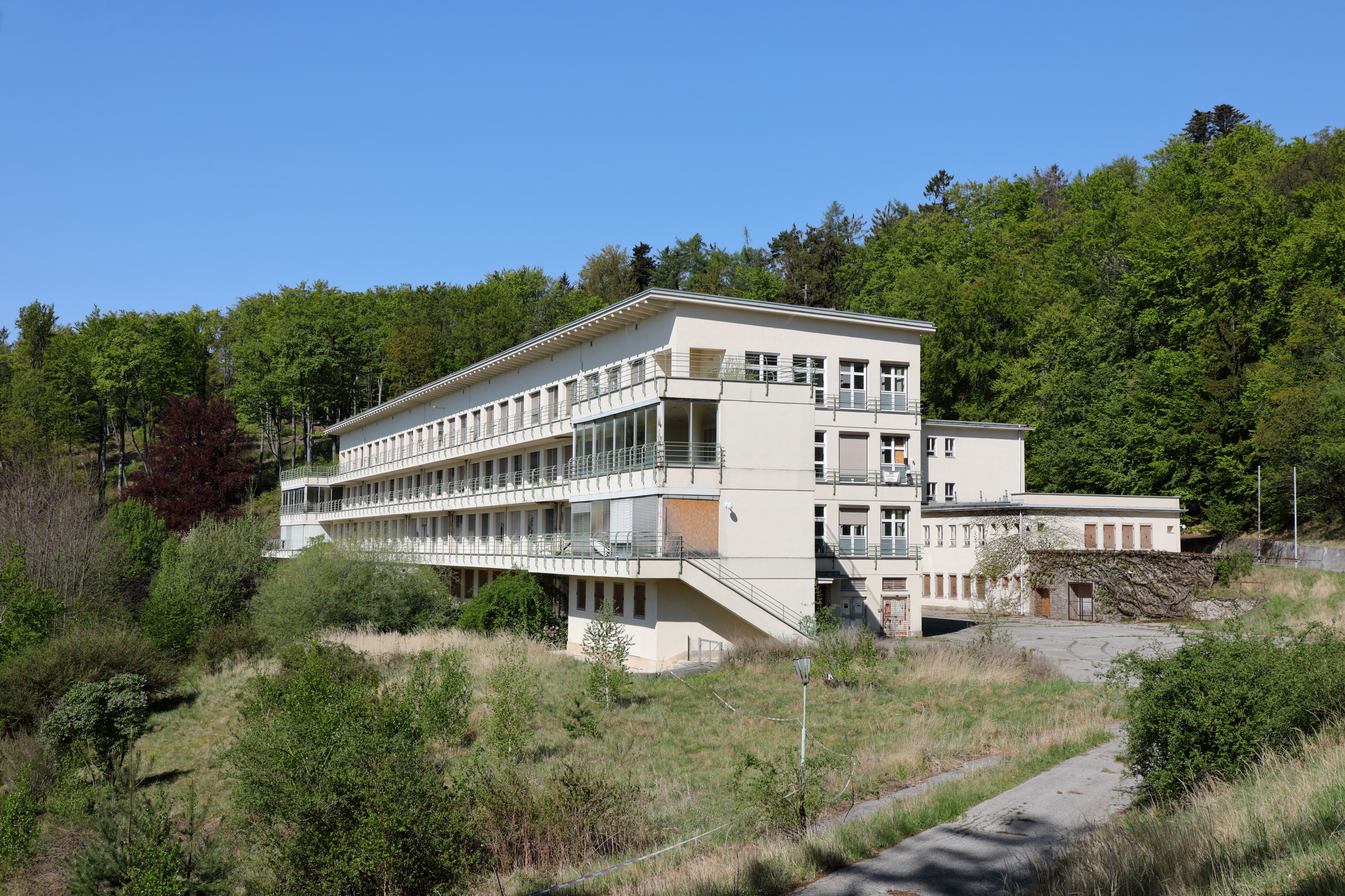 Ostansicht der ehemaligen Lungenheilanstalt bzw. des ehemaligen Landespflegeheimes am Großen Hirschenstein in der burgenländischen Marktgemeinde Rechnitz.Der Gebäudekomplex wurde am 1. Dezember 1955 nach sechsjähriger Bauzeit als Lungenheilstätte für rund 165 Patienten eröffnet. Nachdem ab 1986 die Patienten mit Lungenleiden im Krankenhaus Oberwart behandelt wurden, nutzte man den Gebäudekomplex bis 2012 als Pflegeheim. Der Gesundheitskonzern VAMED hatte bis 2015 ein Nutzungsrecht und Zeit, Pläne für die Nachnutzung vorzulegen. Dies geschah jedoch nicht und daher verfällt seitdem der Gebäudekomplex (Stand: 2020).